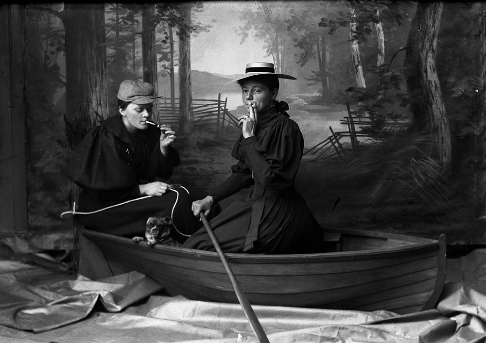 Berg & Høeg Marie Høeg og Bolette Berg i båten. ca. 1895-1903.Sølvgelatin på barytt. NMFF_000418_1